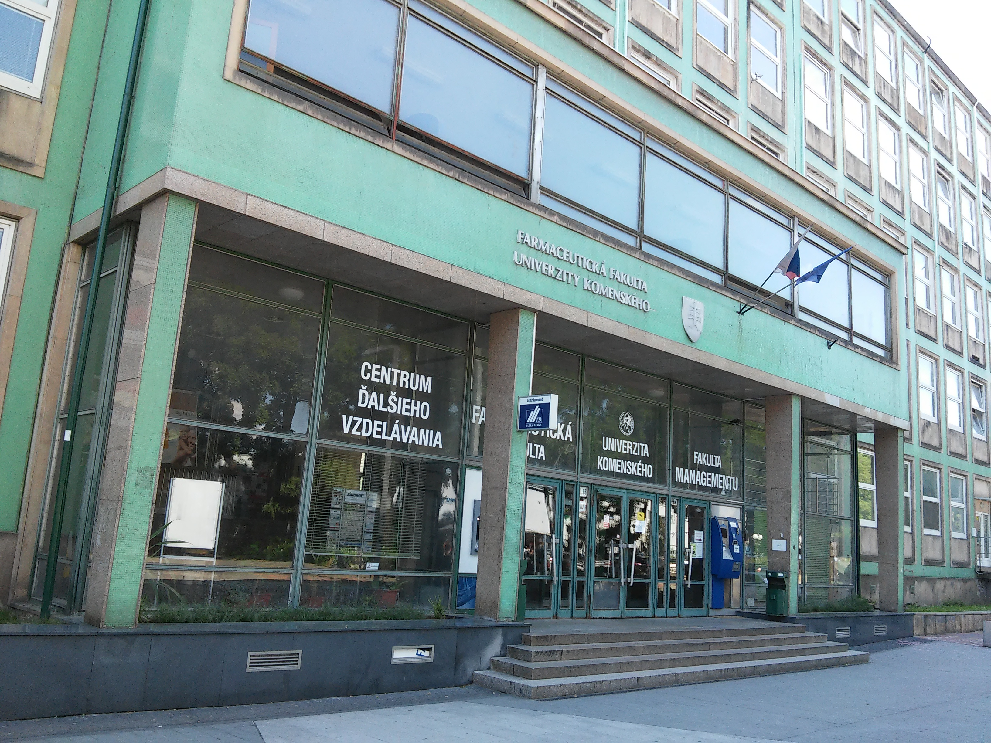 Odbojárov, Nové Mesto, Bratislava